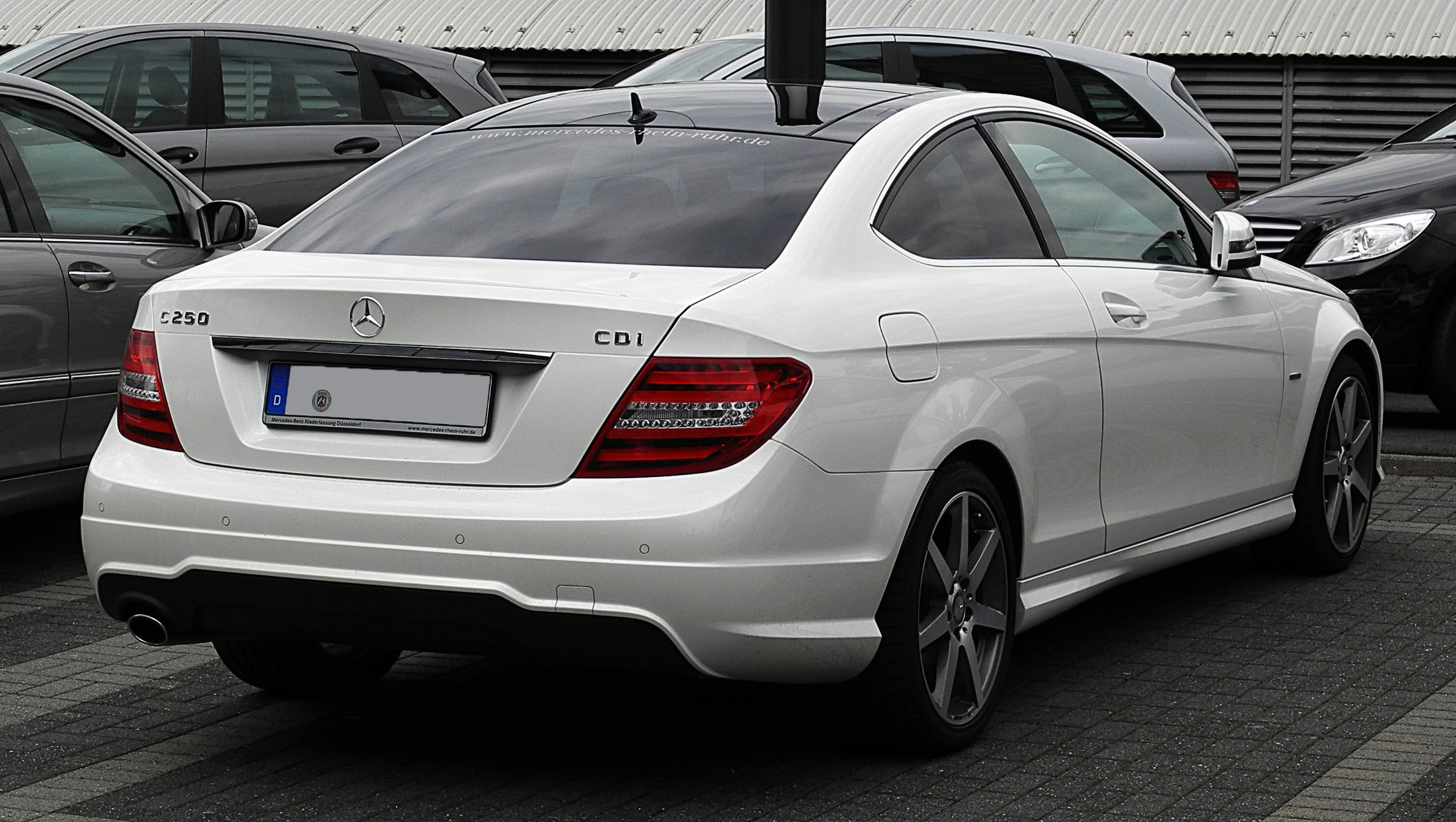 Mercedes-Benz C 250 CDI BlueEFFICIENCY Coupé Edition 1 (C 204)